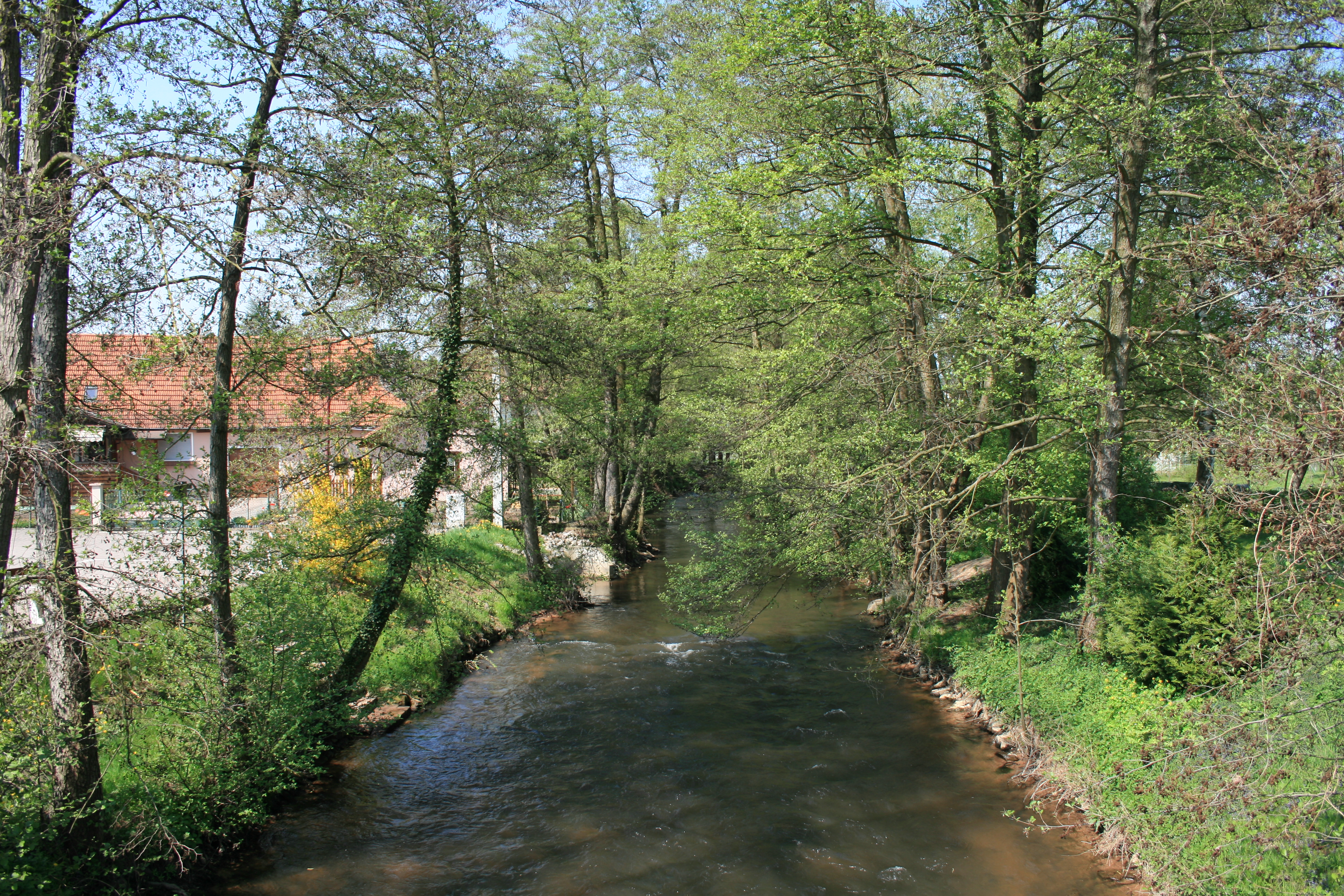 La Lauter entre Scheibenhardt (Palatinate) et Scheibenhard (Alsace)